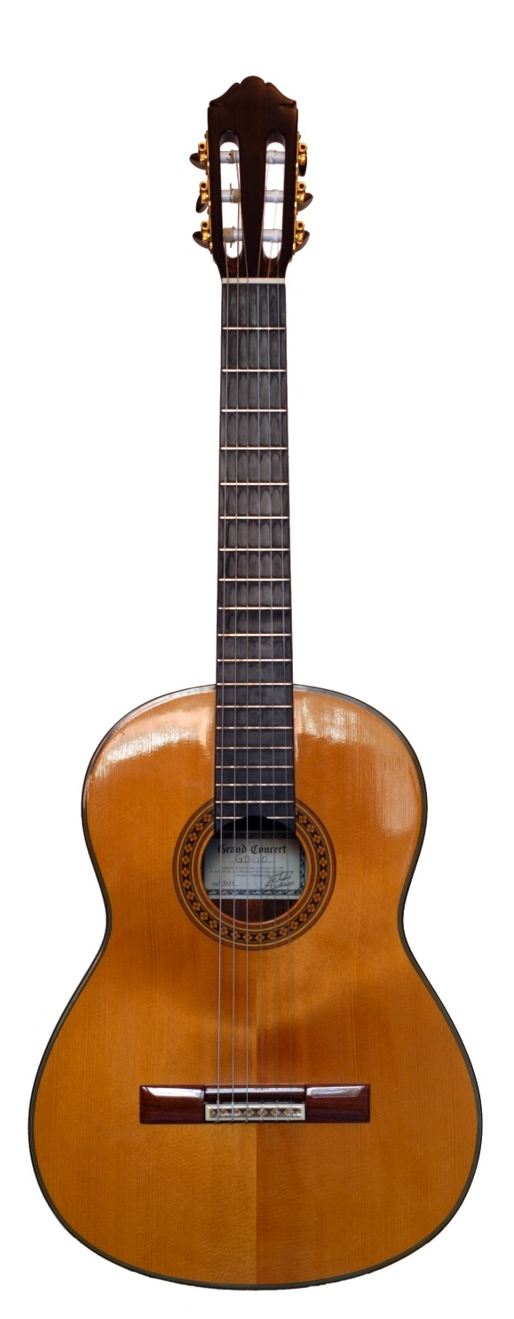 Immagine modificata da Commons per semplificazione Autore dell'immagine originale: Martin Möller Fonte: :commons:Image:Classical_Guitar_two_views.jpg